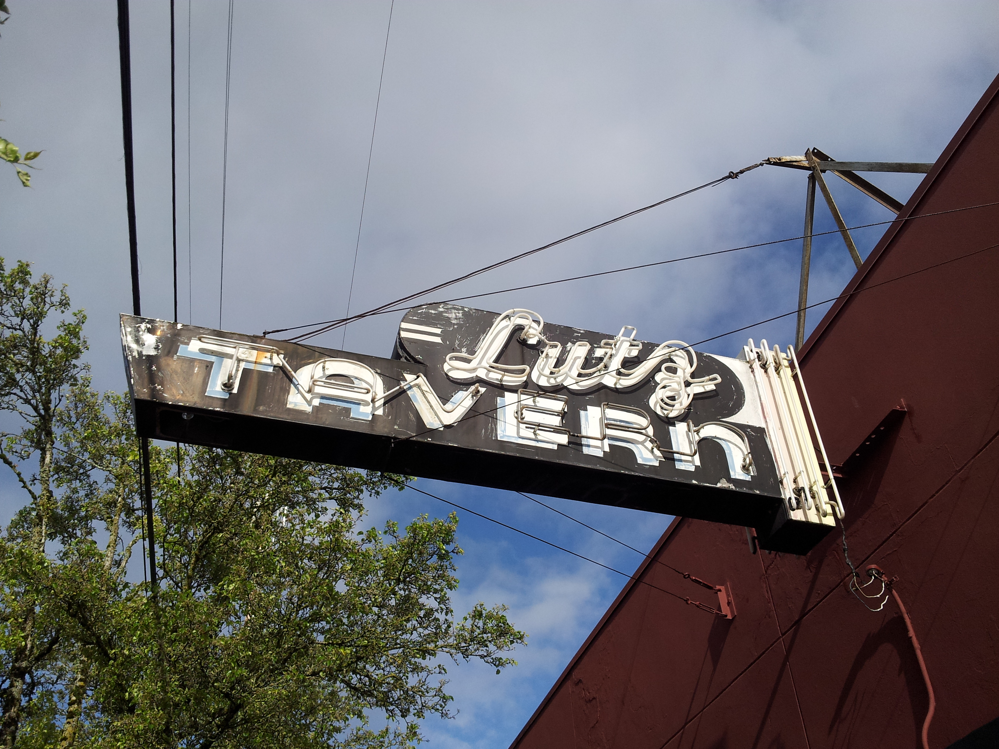 Lutz Tavern, Portland, Oregon (2014)